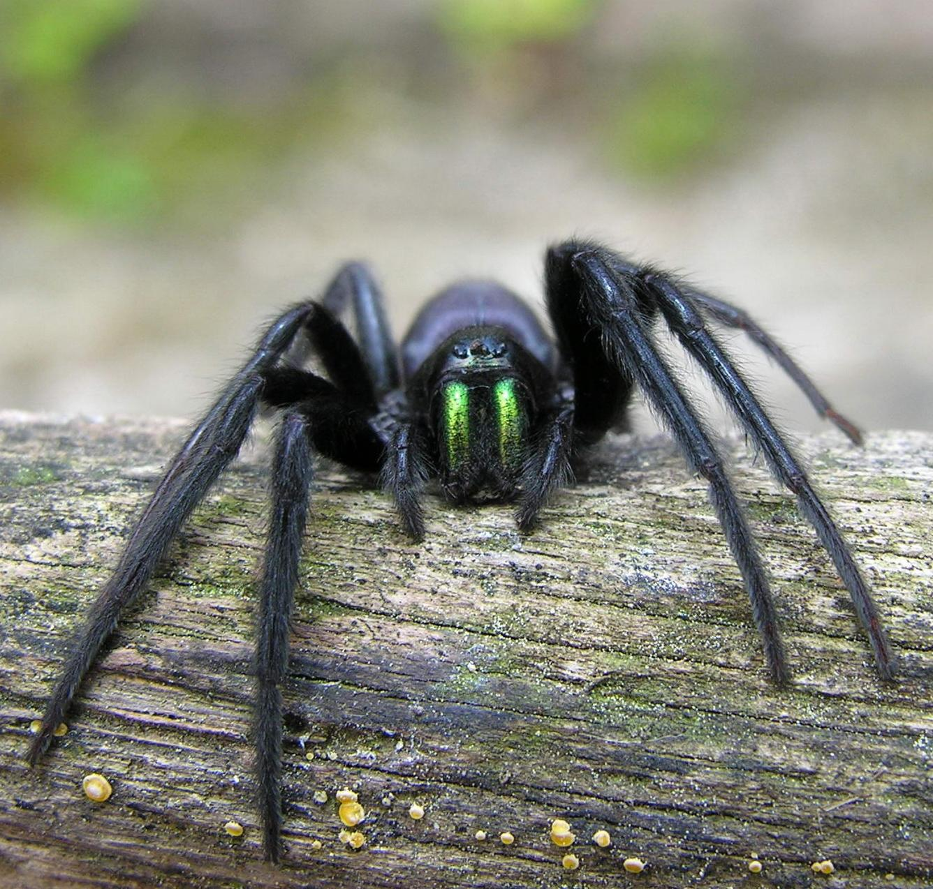 Foto dunha araña (Segestria florentina) realizada en Mandaio, Cesuras, Galicia Publish by= Luis Miguel Bugallo Sánchez. Self made